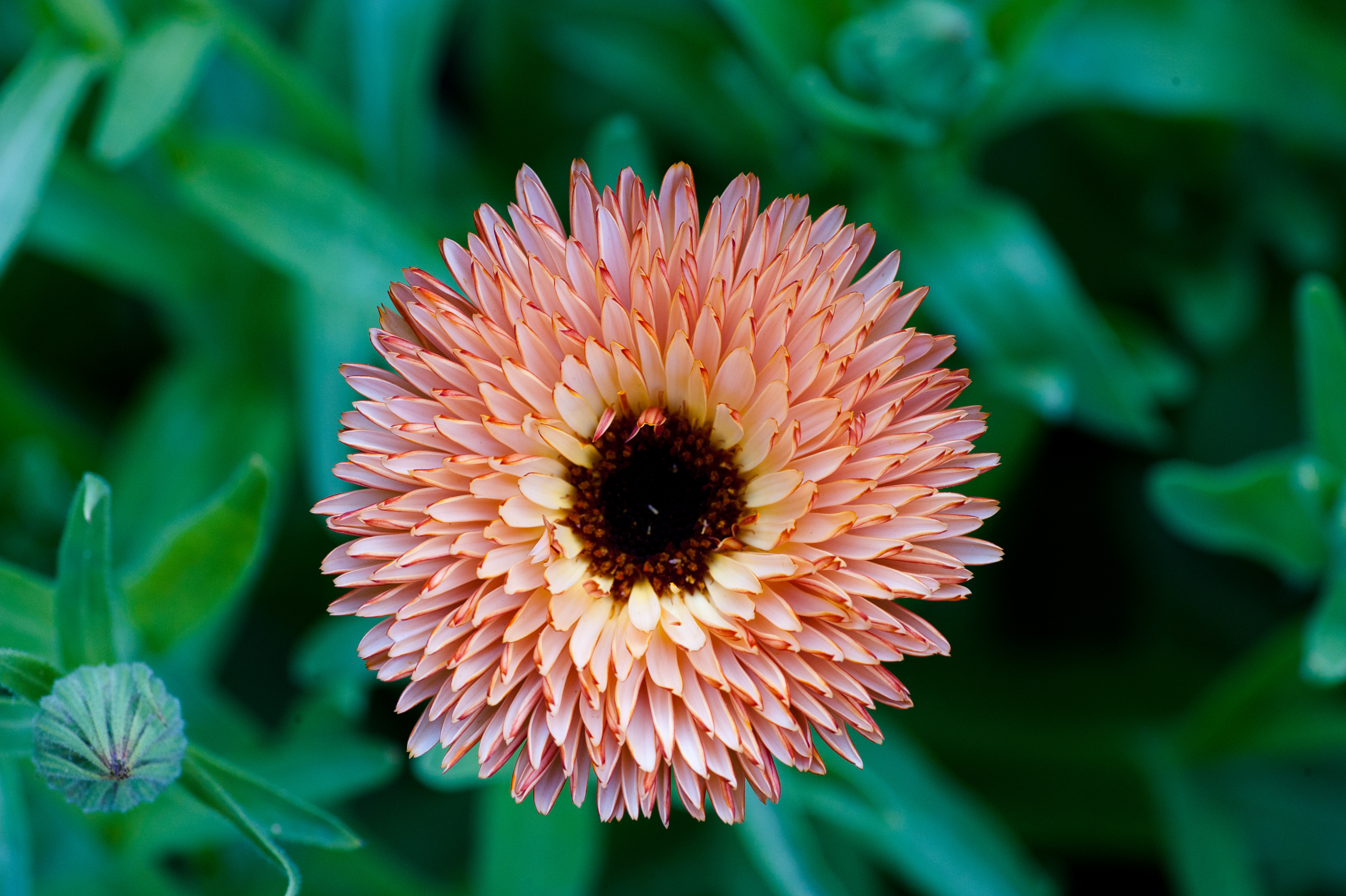 Peachy